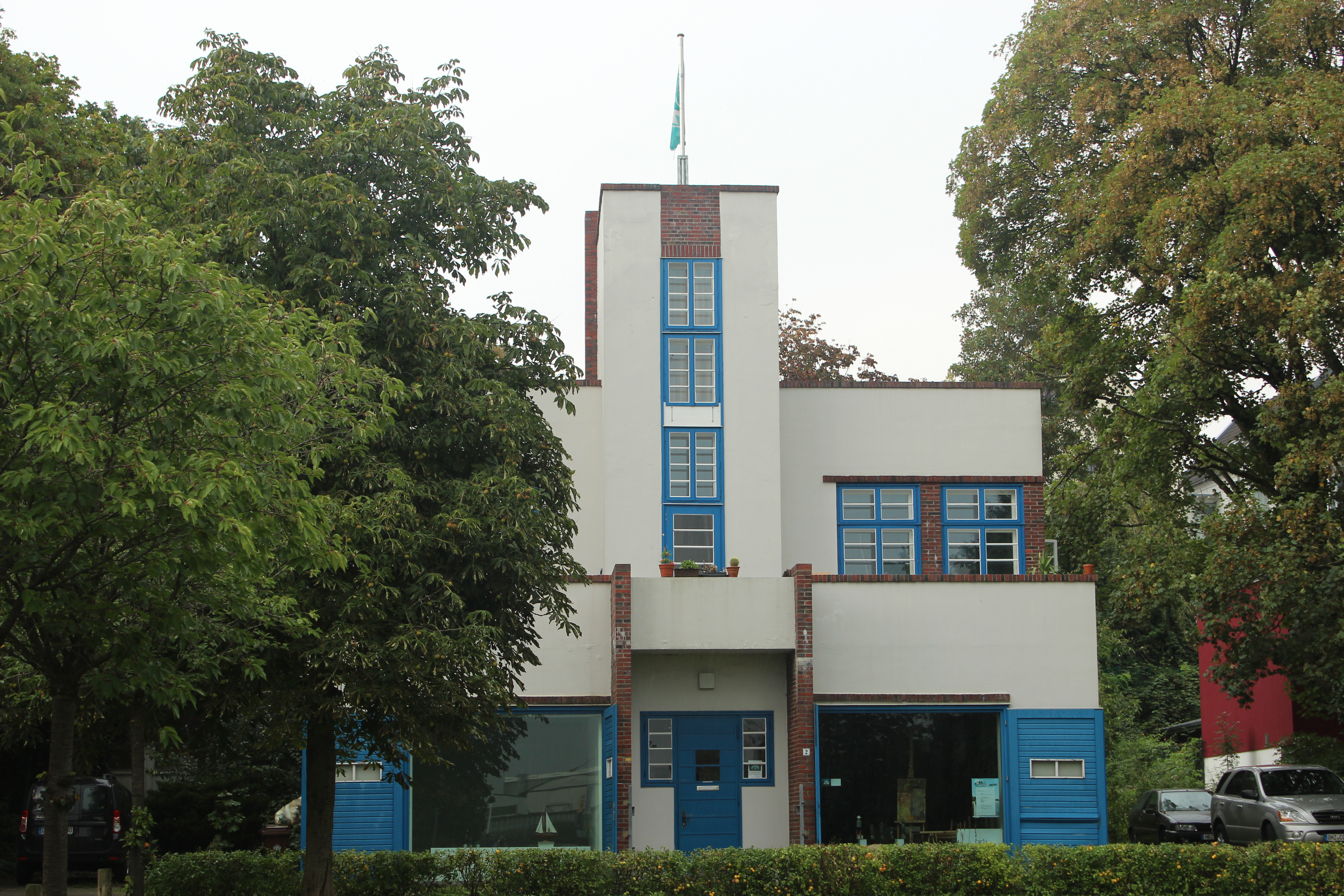 Boots- und Vereinshaus des Vegesacker Rudervereins in Bremen, Vegesacker Weserpromenade 2.Das abgebildete Objekt ist ein geschütztes Kulturdenkmal in der Freien Hansestadt Bremen, mit der Nr. 1318 beim Landesamt für Denkmalpflege registriert.